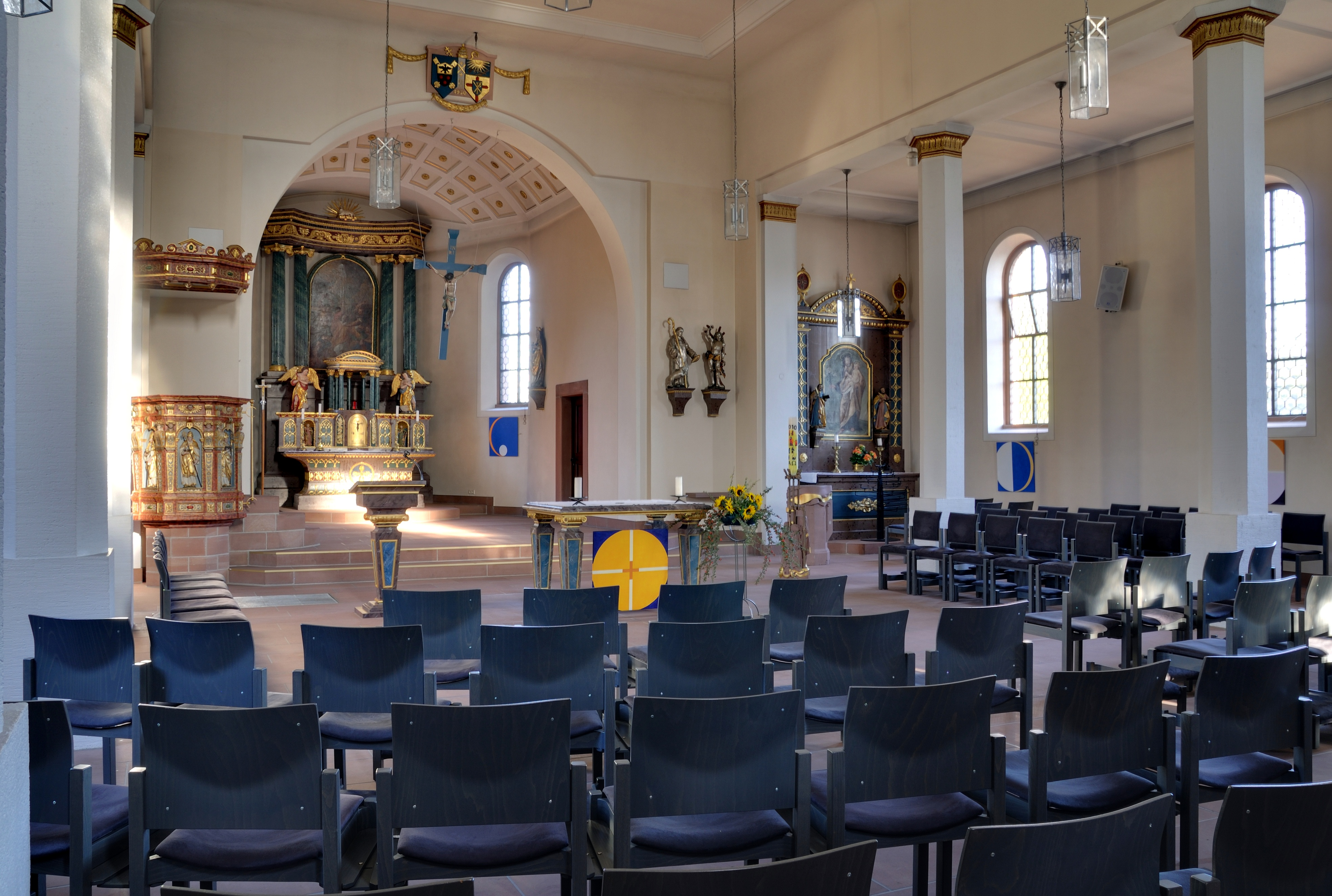 Rheinfelden-Warmbach: Innenraum der Galluskirche